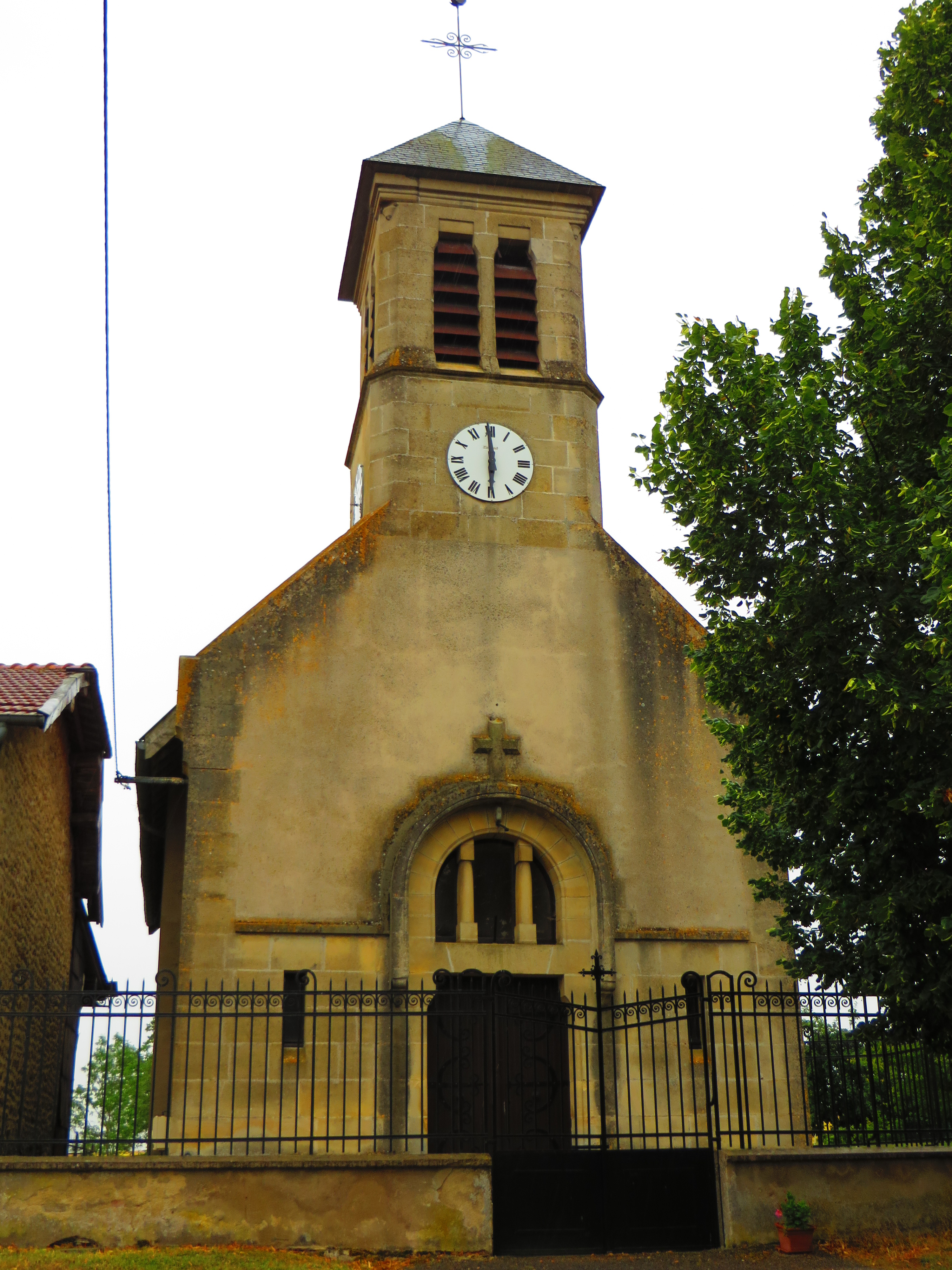 Gincrey L'église Sainte-Agathe